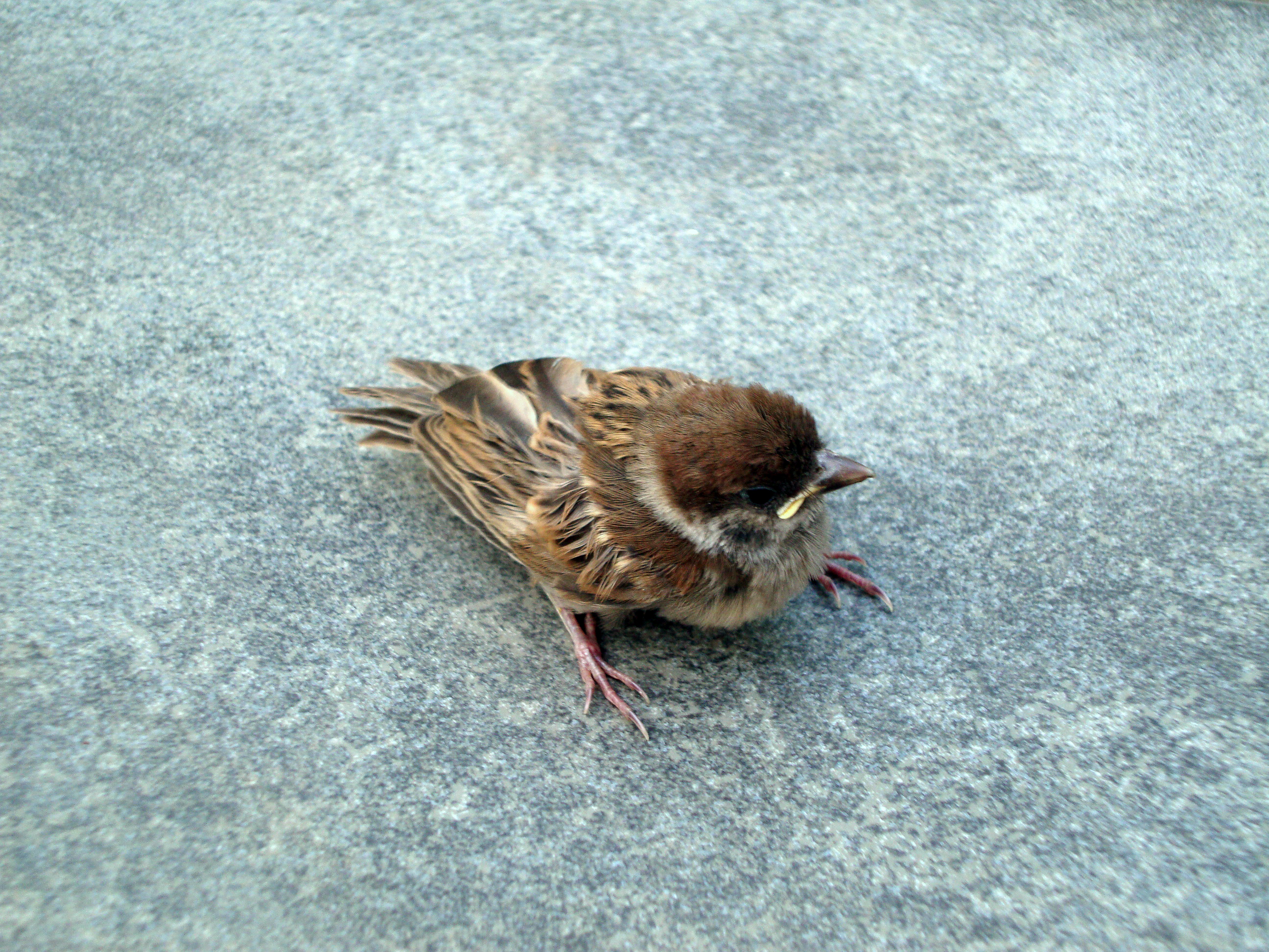 Passer montanus L., 1758